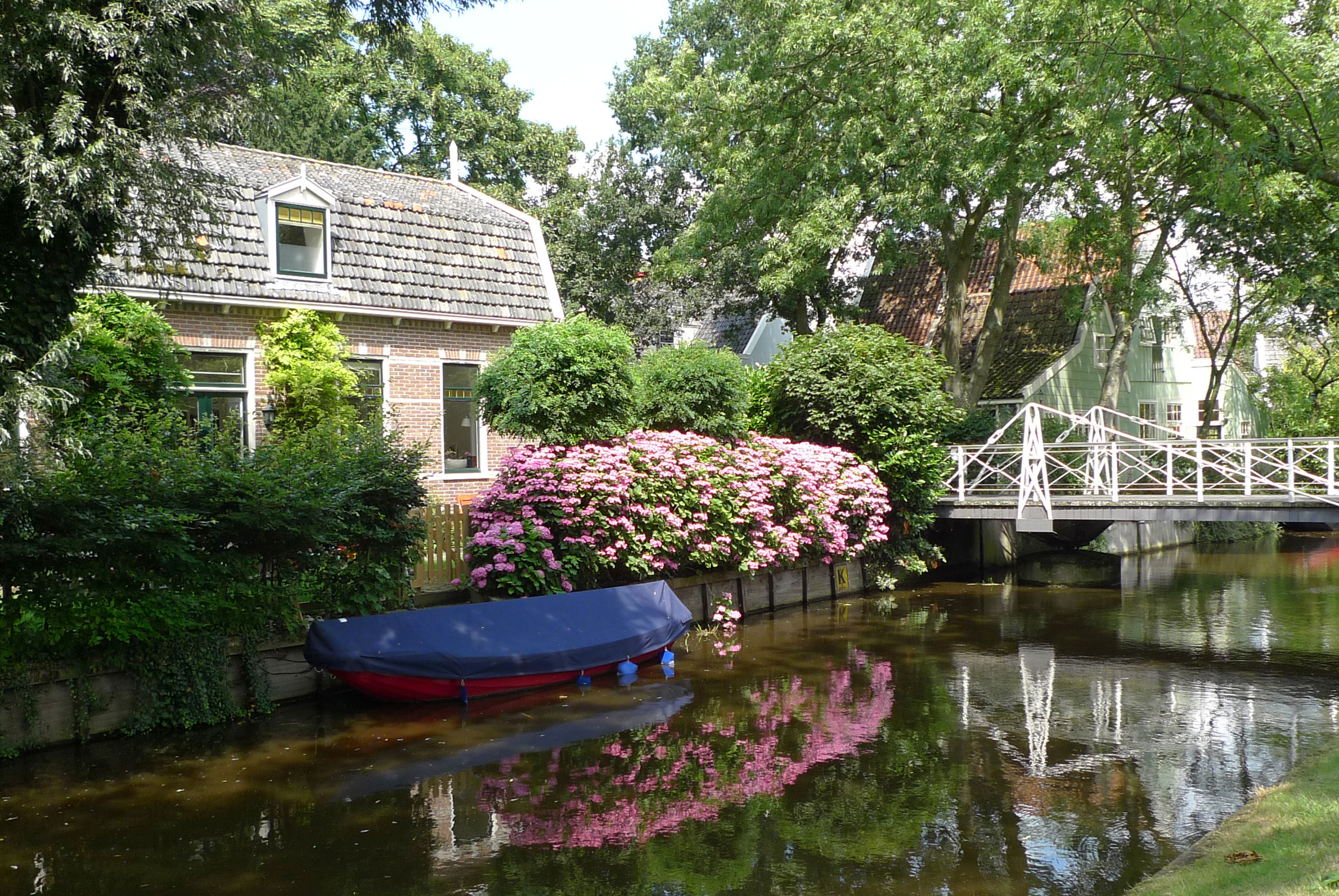 Broek in Waterland, woonhuis aan het Ee,Kerkhofbrug